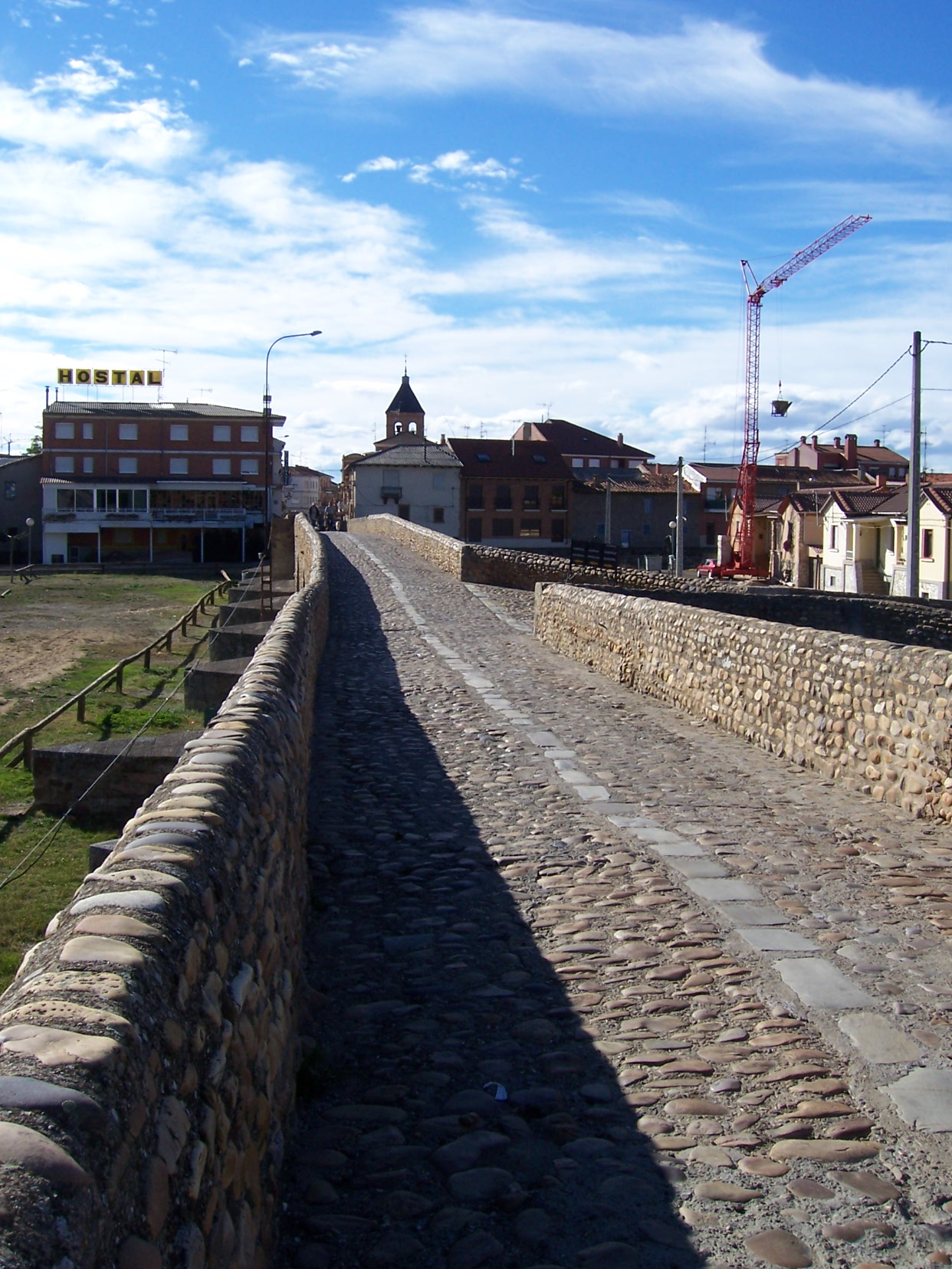 Puente Honroso en Hospital de Óebigo (León, España). Puente por donde pasaban los peregrinos del Camino de Santiago. Autor de la fotografía: Lourdes Cardenal, 2005.